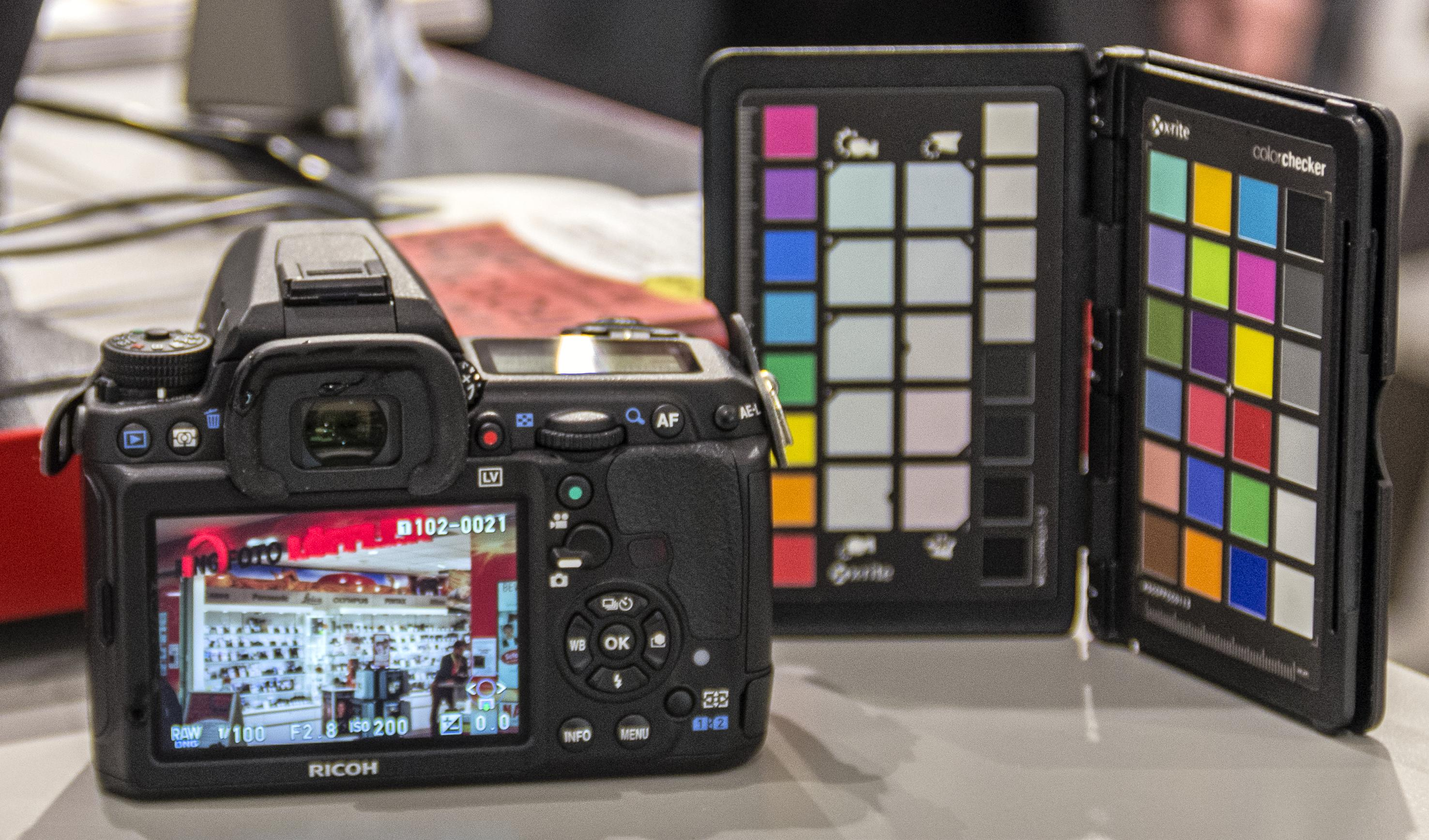 Bilder von der Pentax K-3